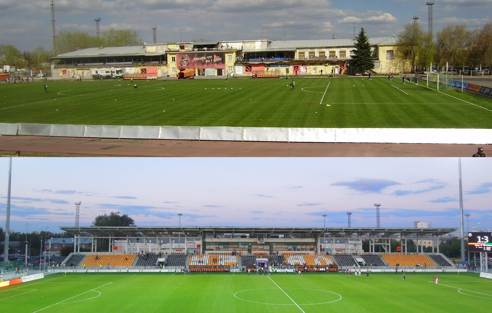 Сравнение стадиона Уралмаш до и после реконструкции 2014-2015